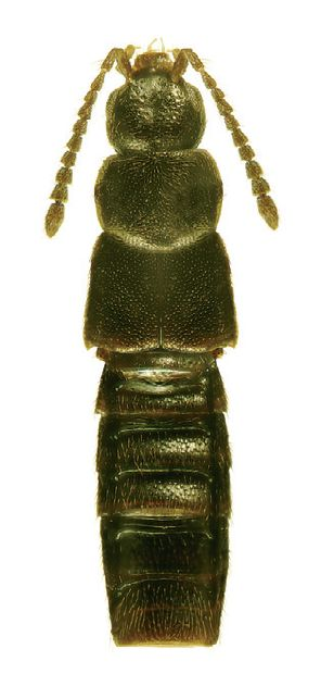 Dochmonota rudiventris